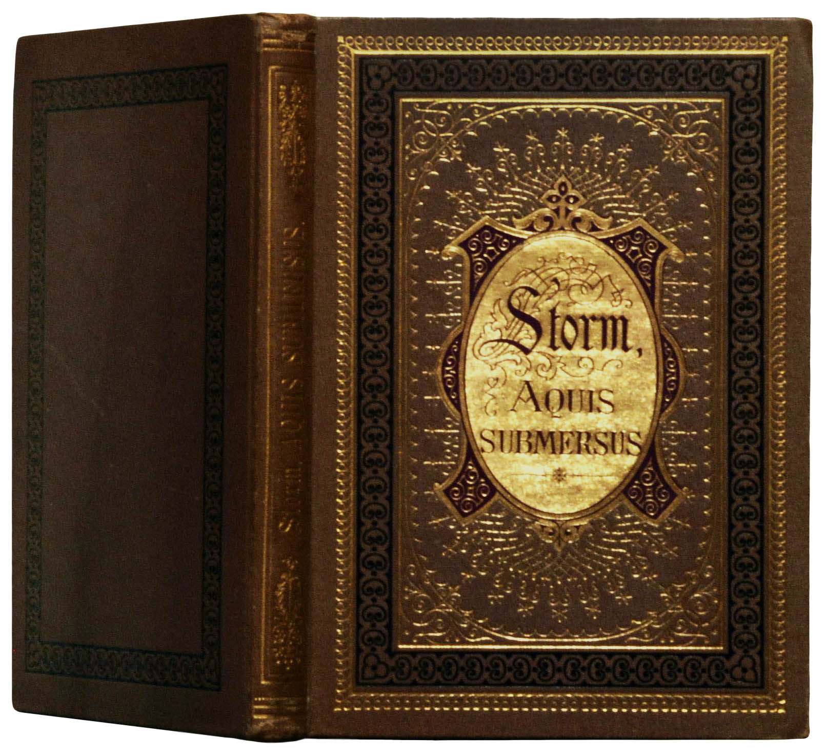 Storm, Theodor: Aquis submersus. Novelle. Berlin: Paetel 1877, 158 Seiten, Erstausgabe Wilpert/Gühring² 28.Original-Leinen, kleines Oktav.